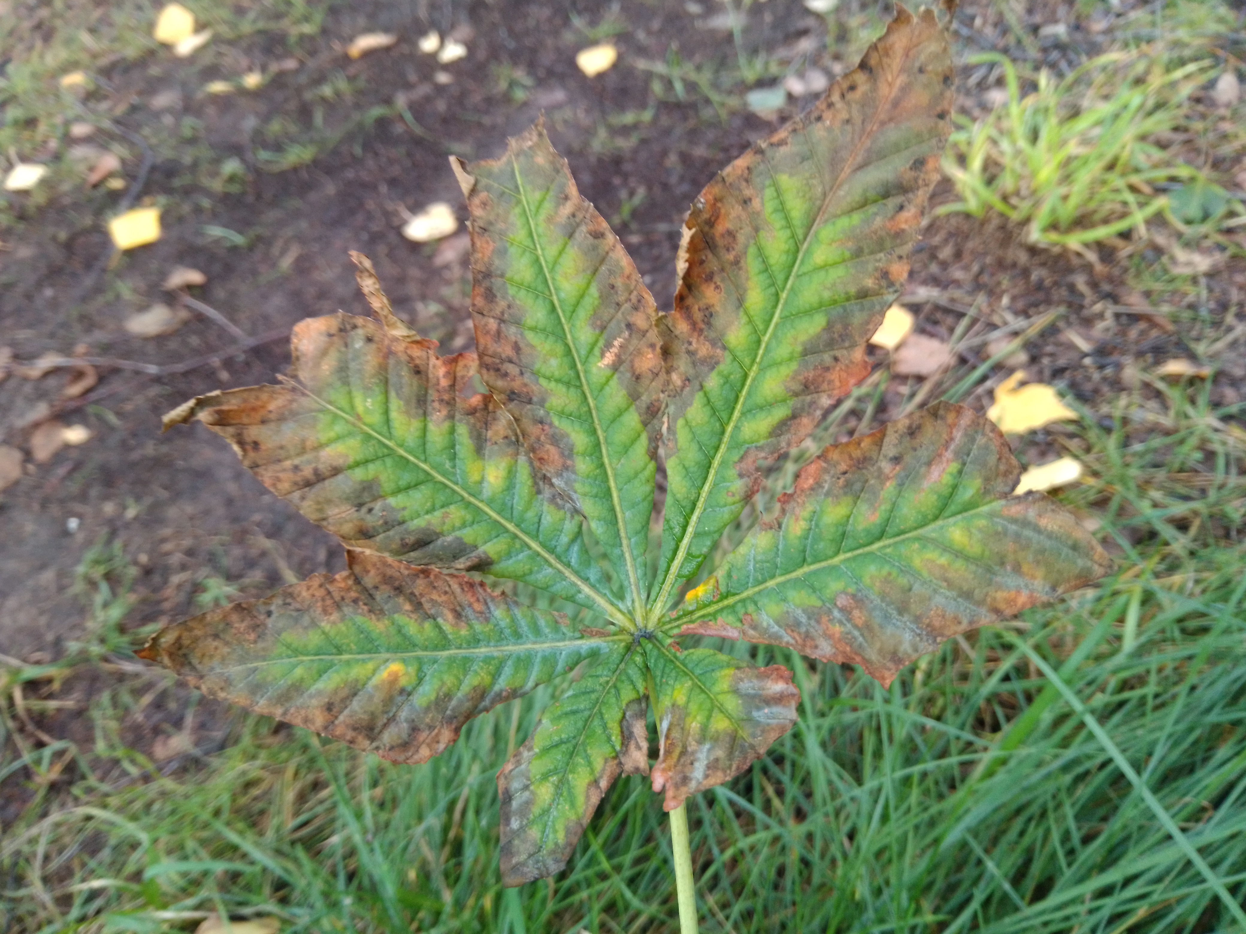 Лист конского каштана, поражённый бурой и чёрной пятнистостью, а также мучнистой росой